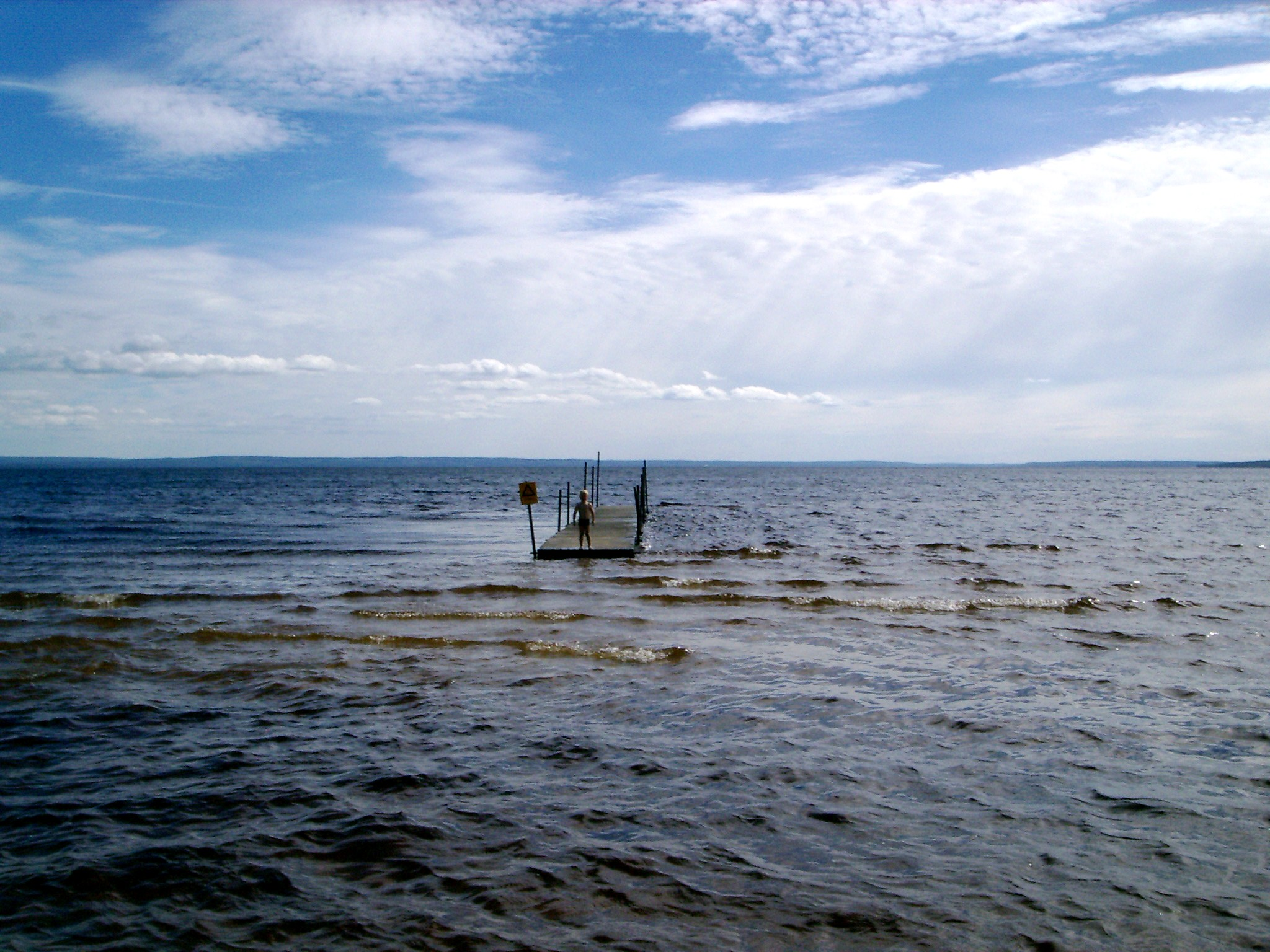 Steg auf dem Skagern